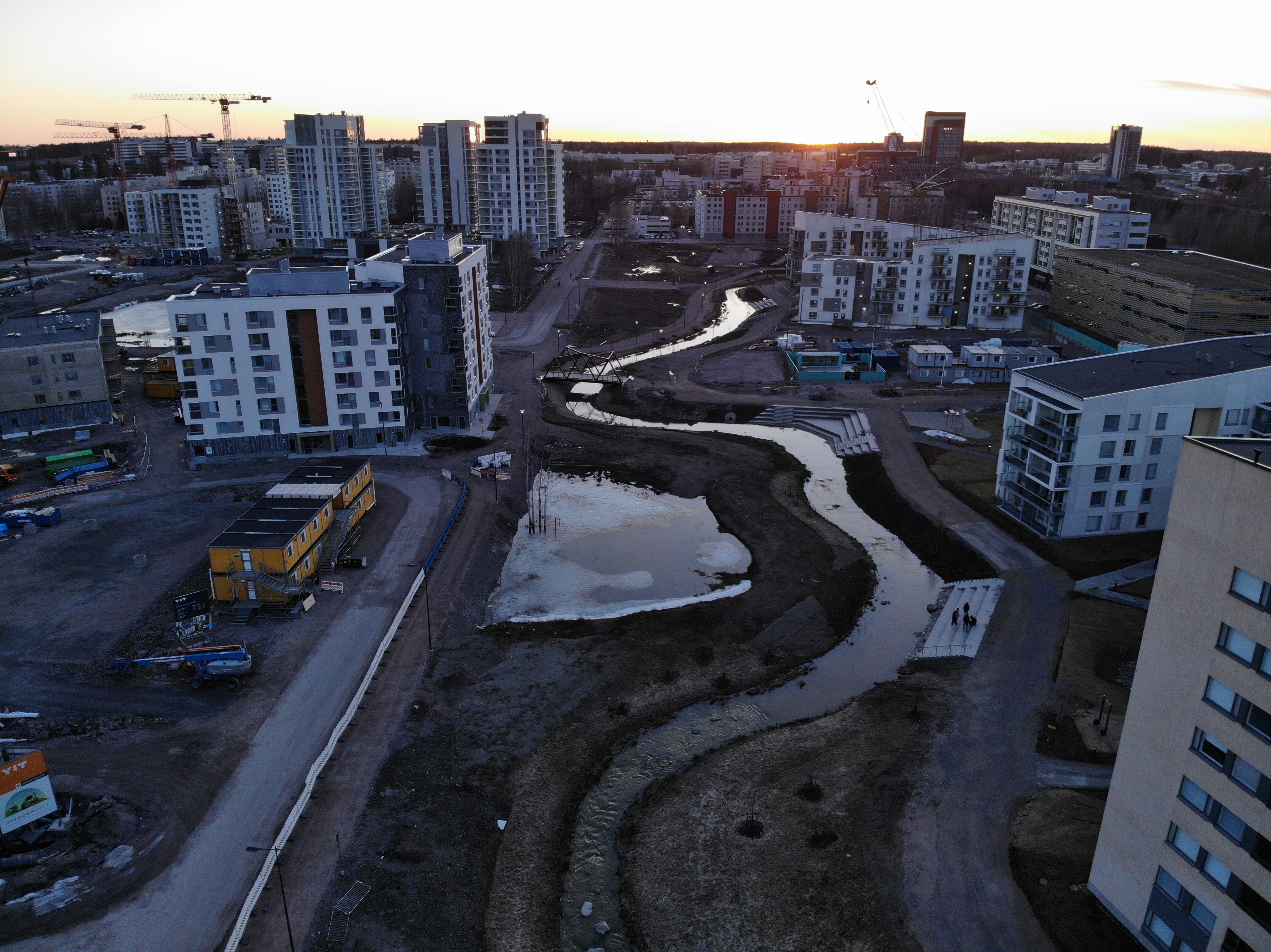 Uutta Vermonniityn aluetta